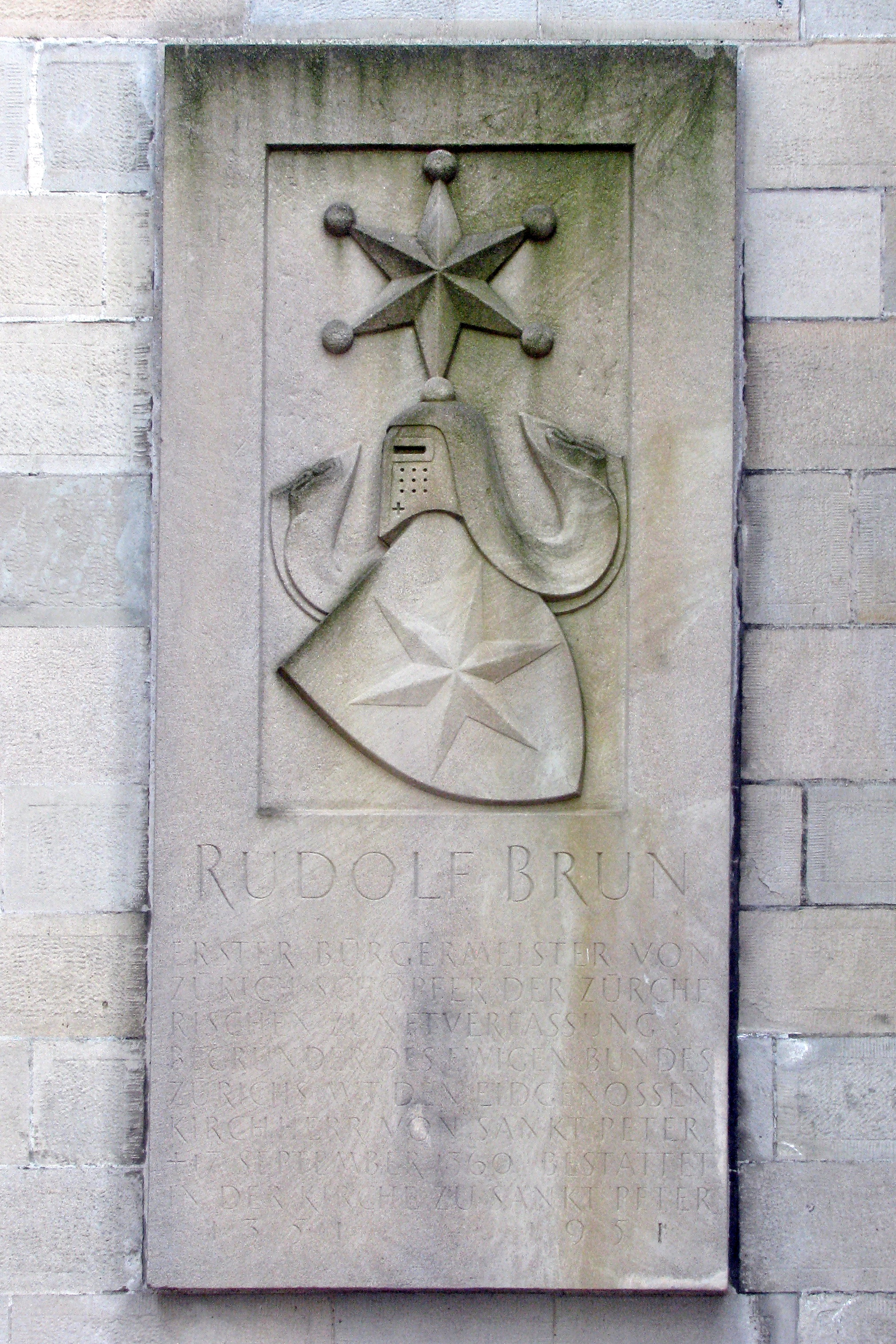 Rudolf Brun's ledger stone at St. Peter Church in Zürich (Switzerland)